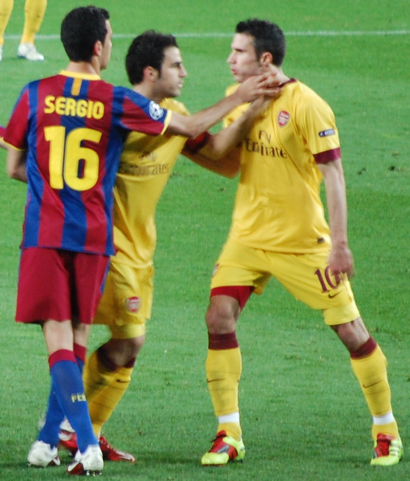 Sergio Busquets, Cesc Fàbregas & Robin van Persie